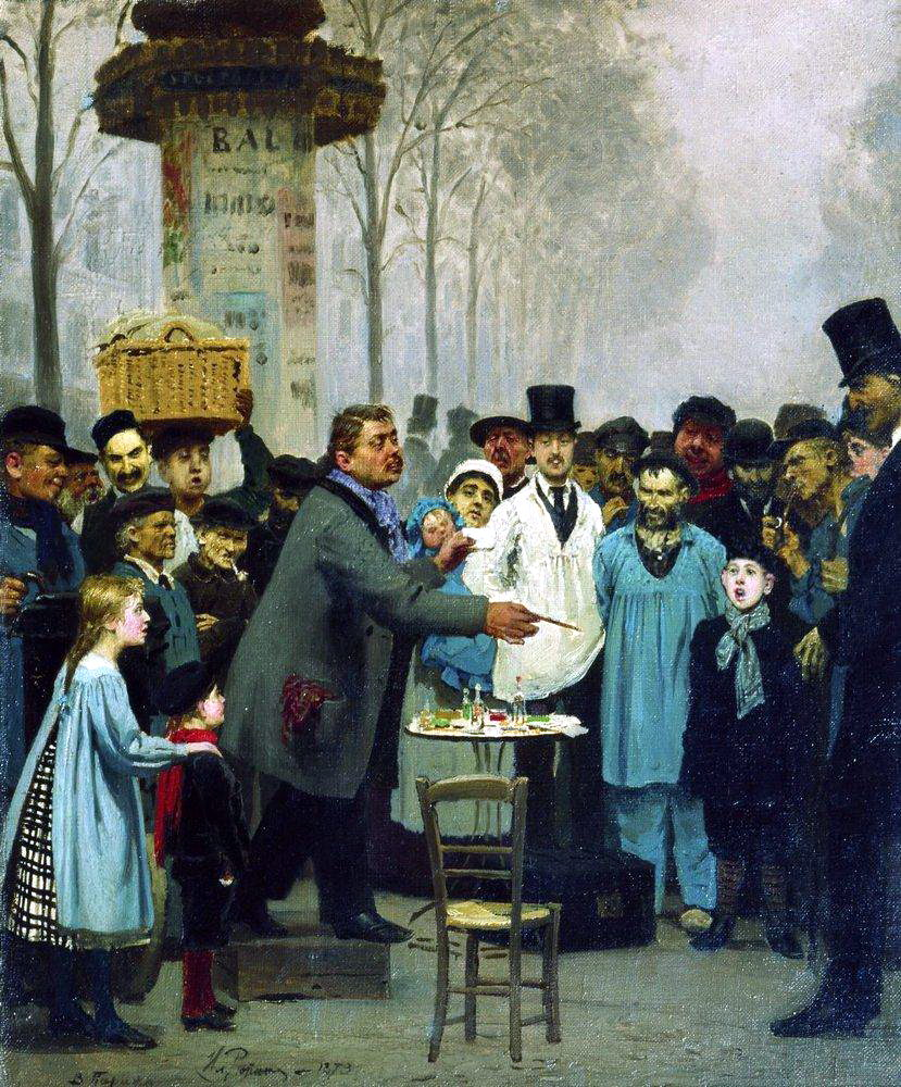 A Newspaper Seller in Parislabel QS:Len,"A Newspaper Seller in Paris" label QS:Lde,"Ein Zeitungsverkäufer in Paris" label QS:Lru,"Продавец новостей в Париже"